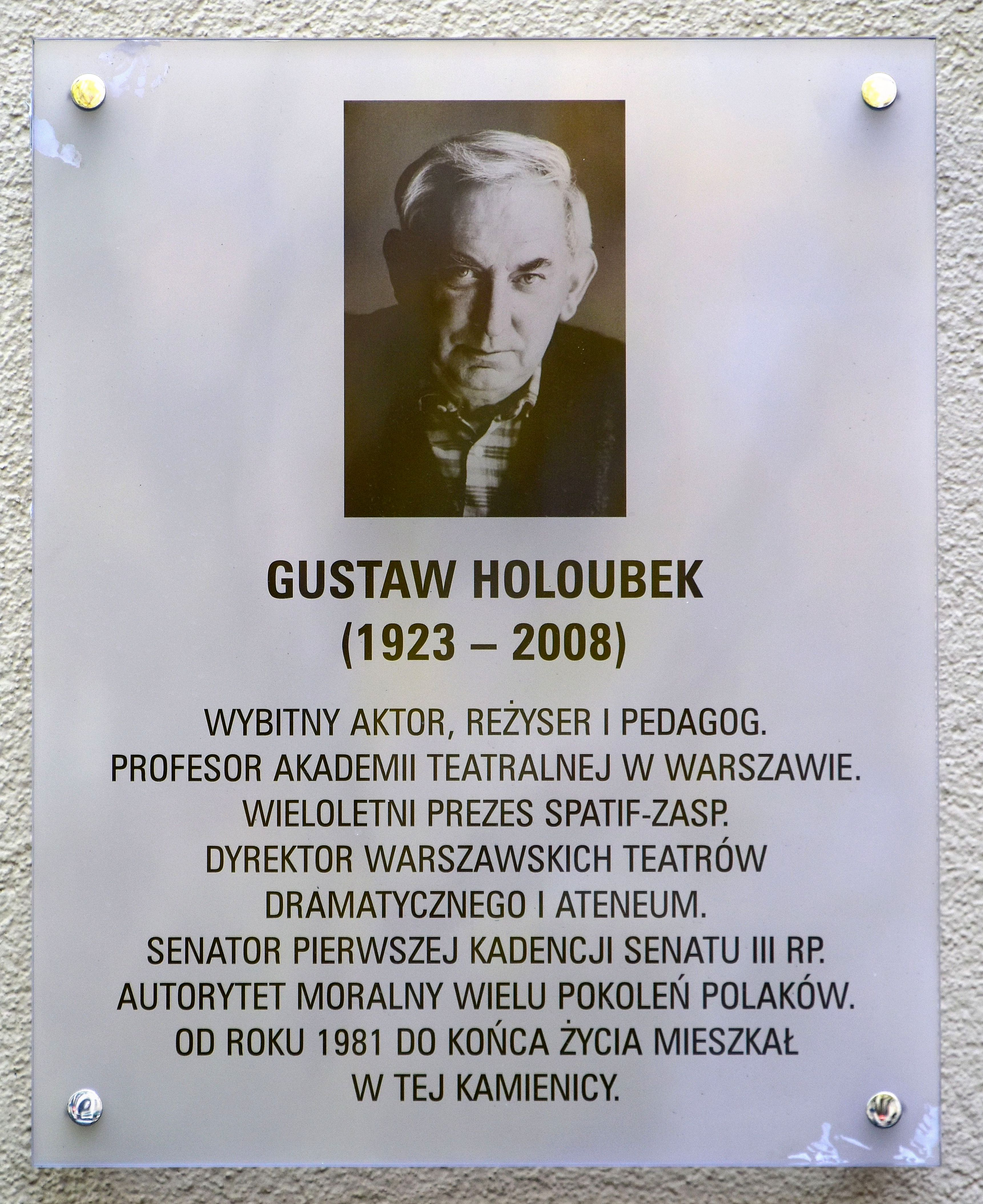 Tablica upamiętniająca Gustawa Holoubka na fasadzie kamienicy przy ul. Narbutta 53 w Warszawie, odsłonięta 21 kwietnia 2018